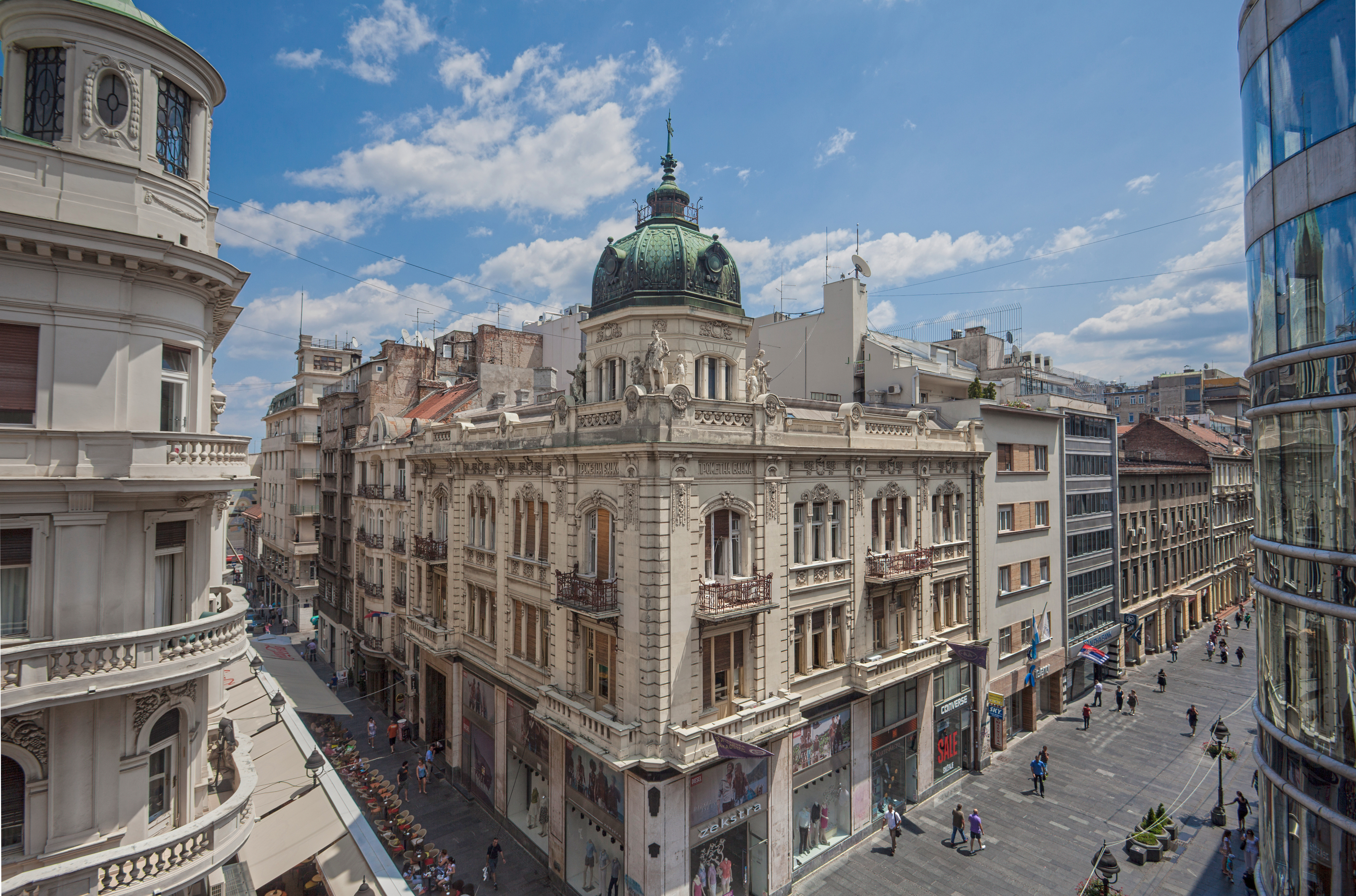 Zgrada Beogradske bankarske akademije